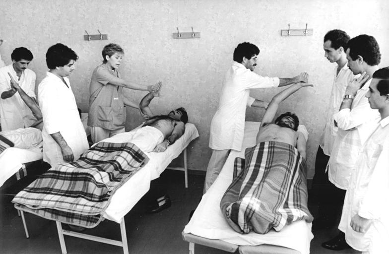 Nordhausen, Ausbildung von Physiotherapeuten ADN-ZB Hirndorf 26.11.86-Bez. Erfurt: Künftige Physiotherapeuten aus der Syrischen Arabischen Republik werden in der medizinischen Fachschule des Maxim-Zetkin-Krankenhauses in Nordhausen ausgebildet. Praktischen Unterricht in der Krankengymnastik erteilt Bernadette Metz (3.v.l.). Insgesamt werden im Jahr 444 Studenten aus neun DDR-Bezirken und dem Ausland in Nordhausen unterrichtet. Sie werden als Kranken- und Kinderkrankenpfleger, als Stomatologische Assistenten, Physiotherapeuten und Medizinisch-Technische Funktionsdiagnostiker tätig sein. 25 ärztliche Fachdozenten vermitteln den Studenten das nötige Wissen. Der praktische Unterricht erfolgt in dem 1973 eröffneten Krankenhaus in unmittelbarer Nachbarschaft.